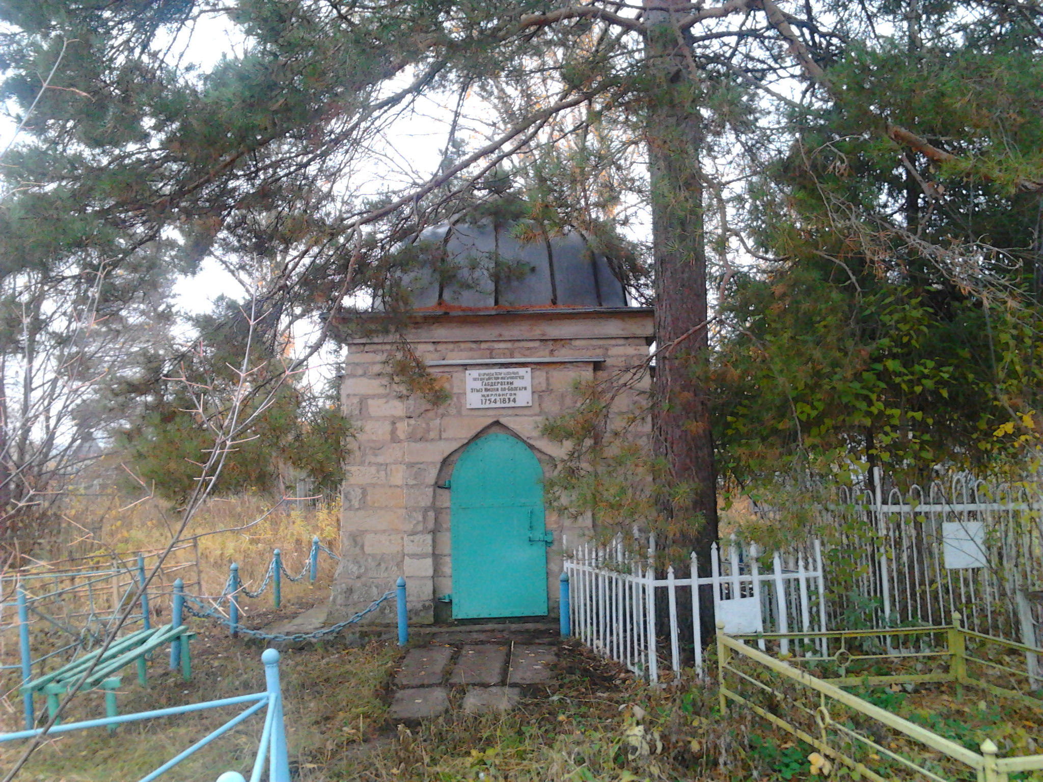 Мавзолей Утыз Имяни, с.Темяшево, Лениногорский р-н. Татарстан